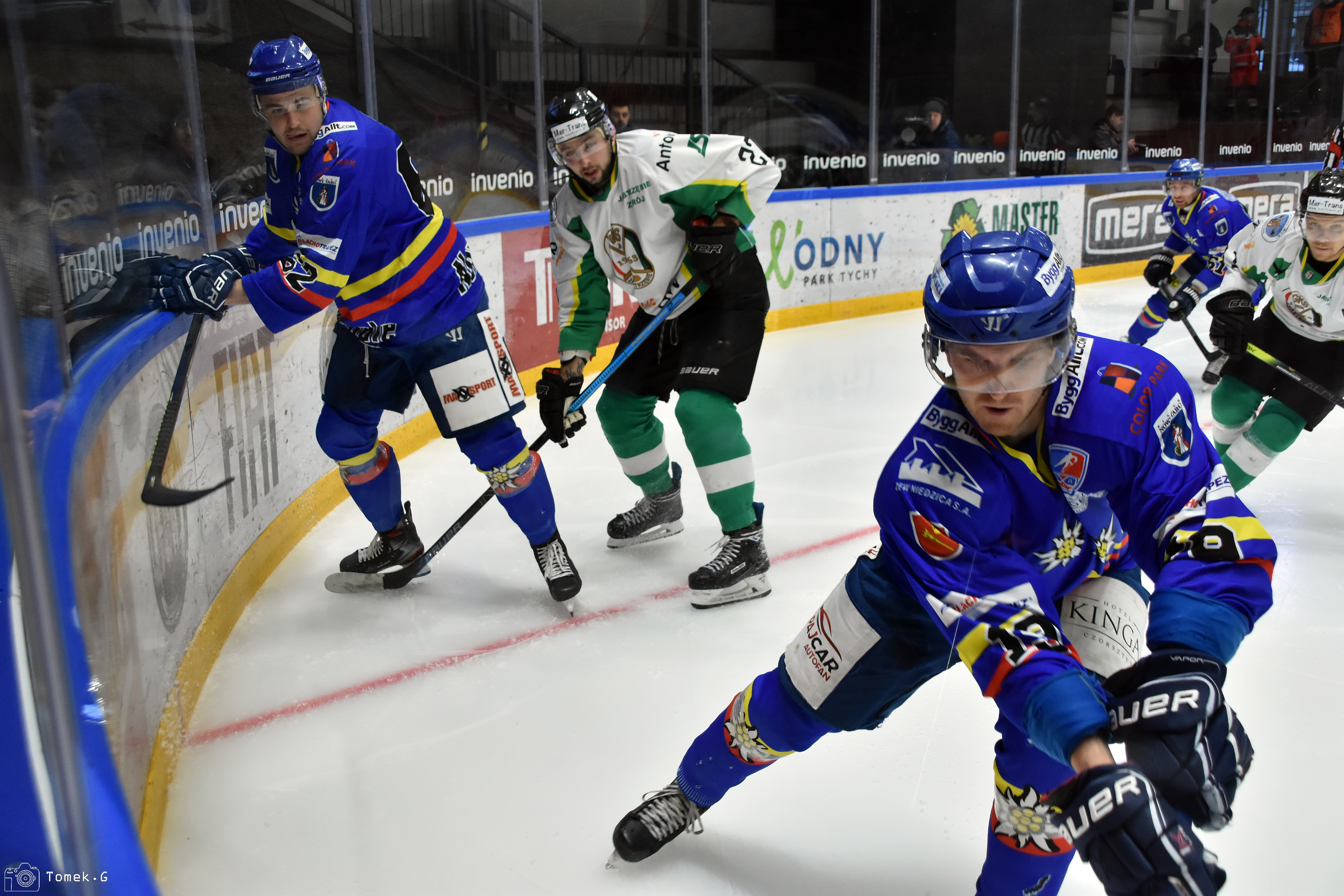 Puchar Polski w Hokeju na Lodzie 2019-2020 JKH Jastrzębie - Podhale Nowy Targ 1-3 1